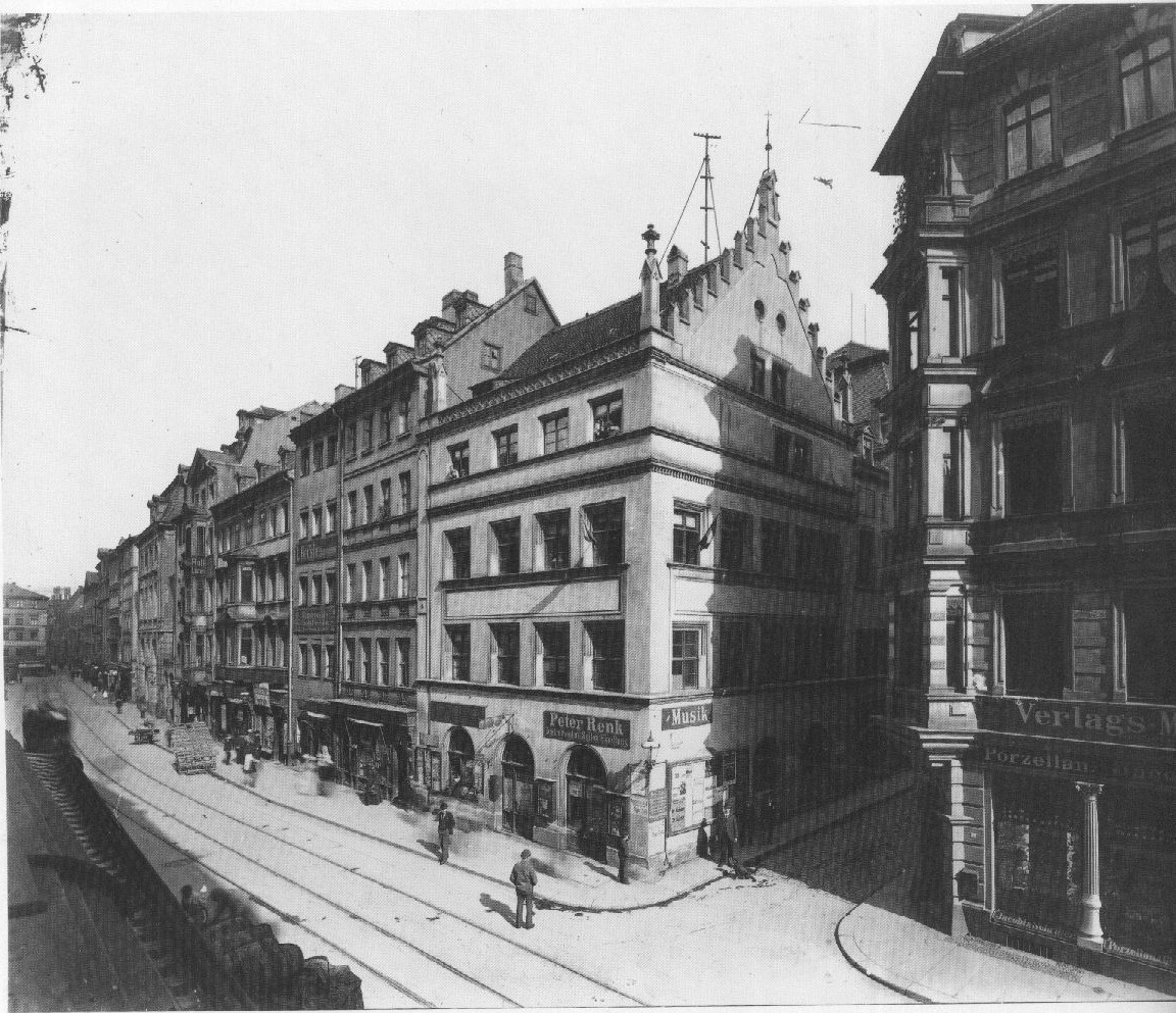 Das Kramerhaus in Leipzig, Neumarkt / Kupfergasse Nr. 1 im Jahre 1899. Das Haus wurde im Zuge des Neubaus "Städtisches Kaufhaus" abgebrochen.